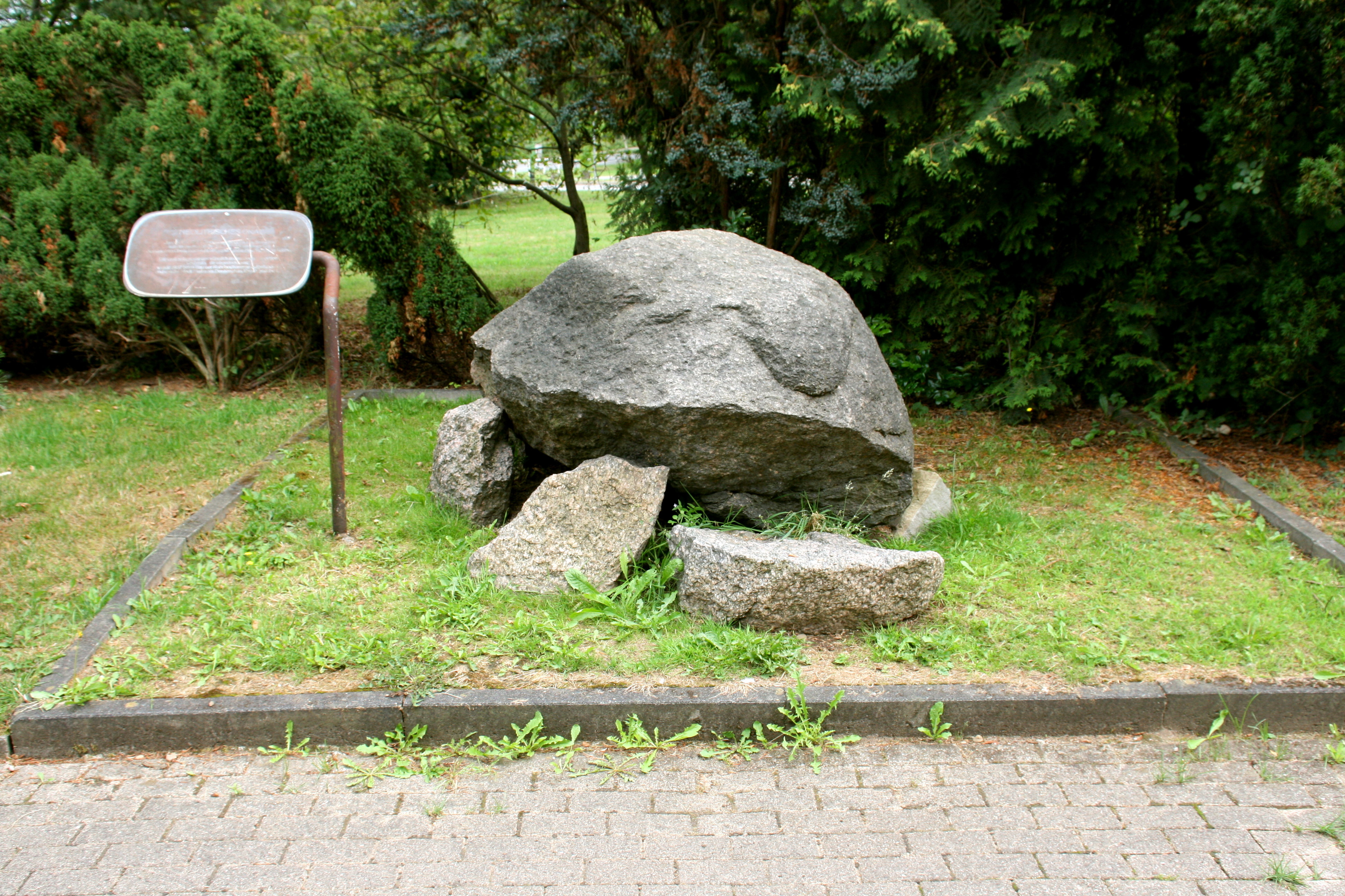 An diese Stelle versetzte Steinkiste, Hellersberg in Essen-Kupferdreh